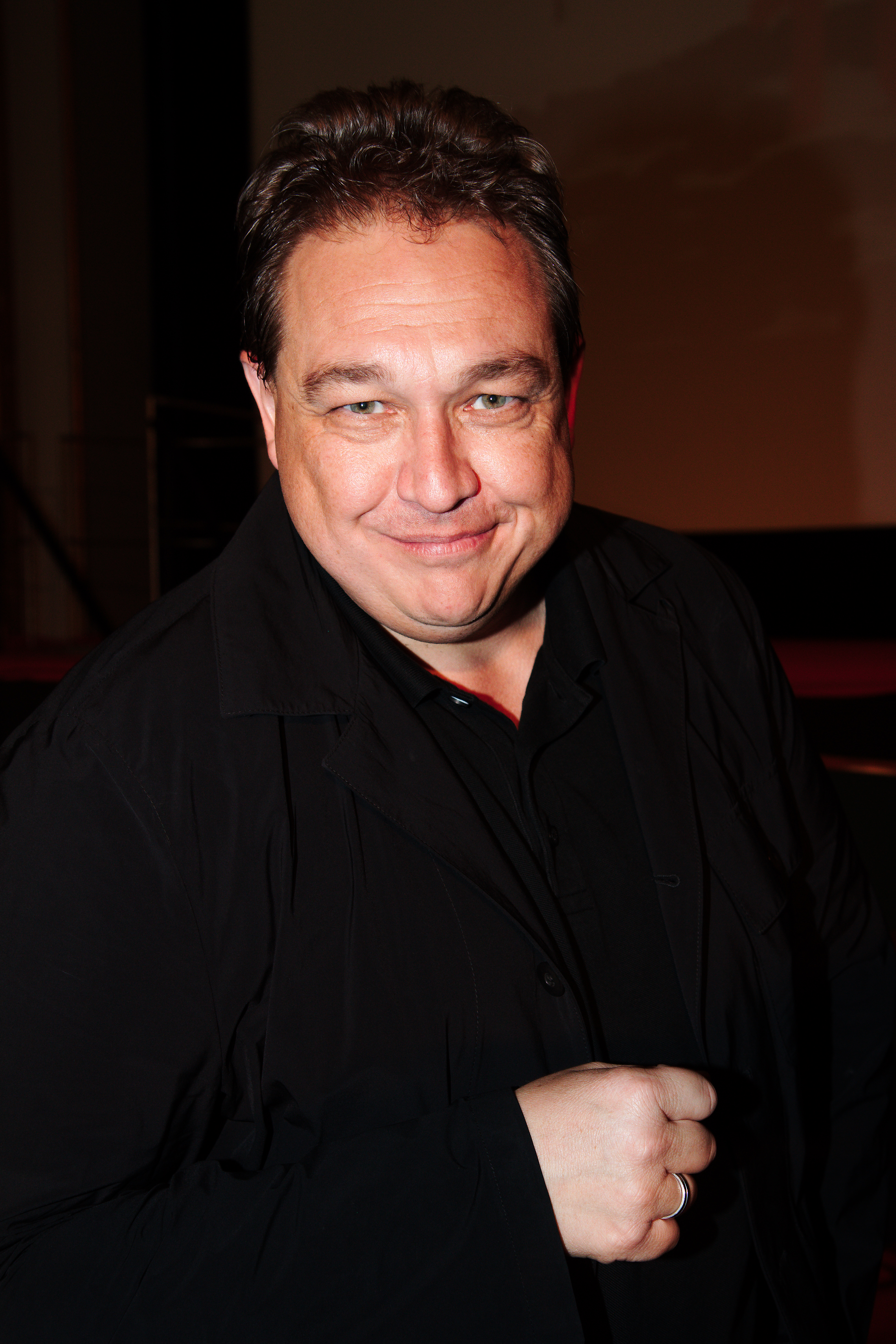 Aufnahme der 100. Folge Fernsehkritik.TV Ort: Babylon Kino Berlin